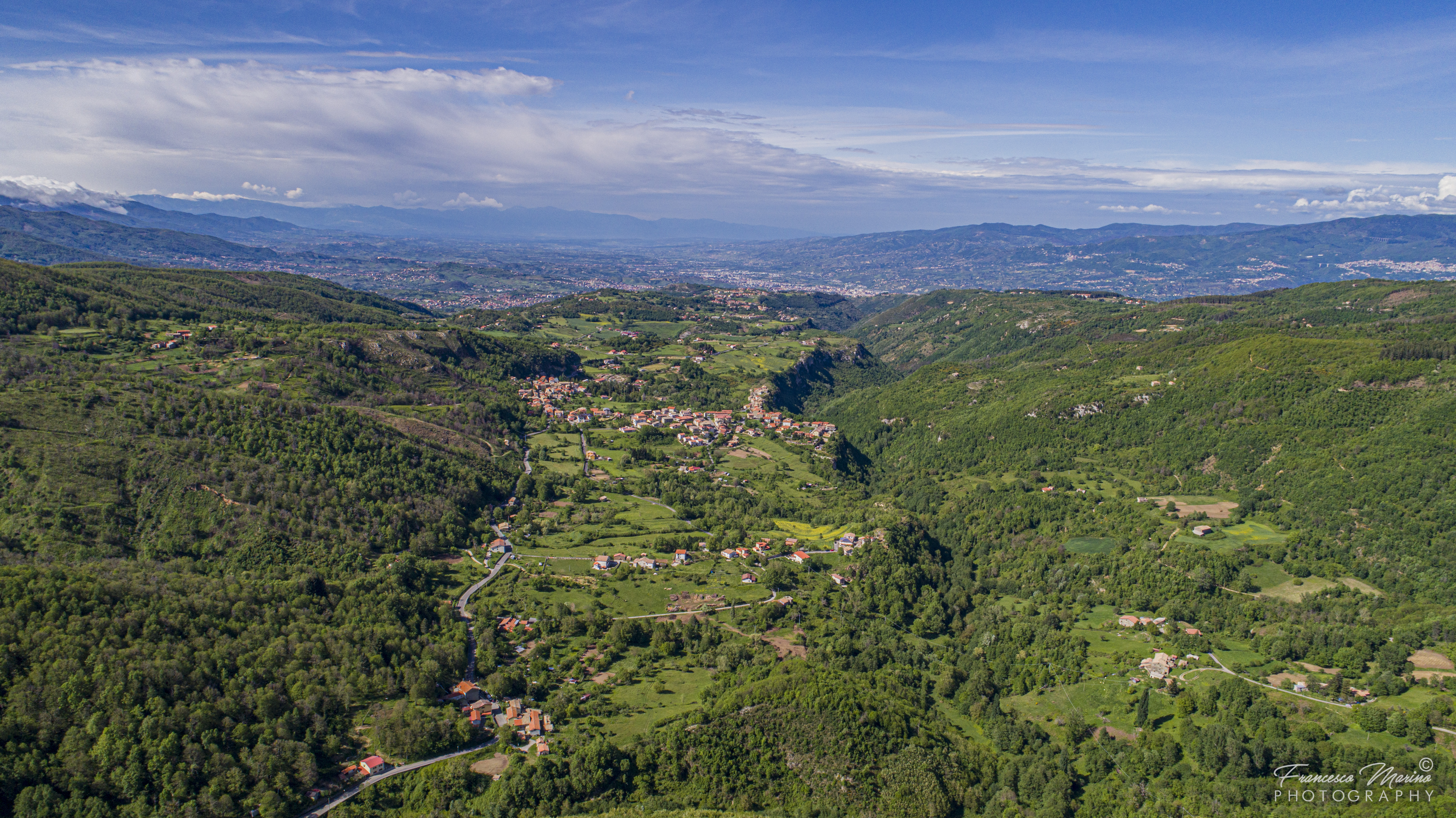 Foto Panoramica Domanico